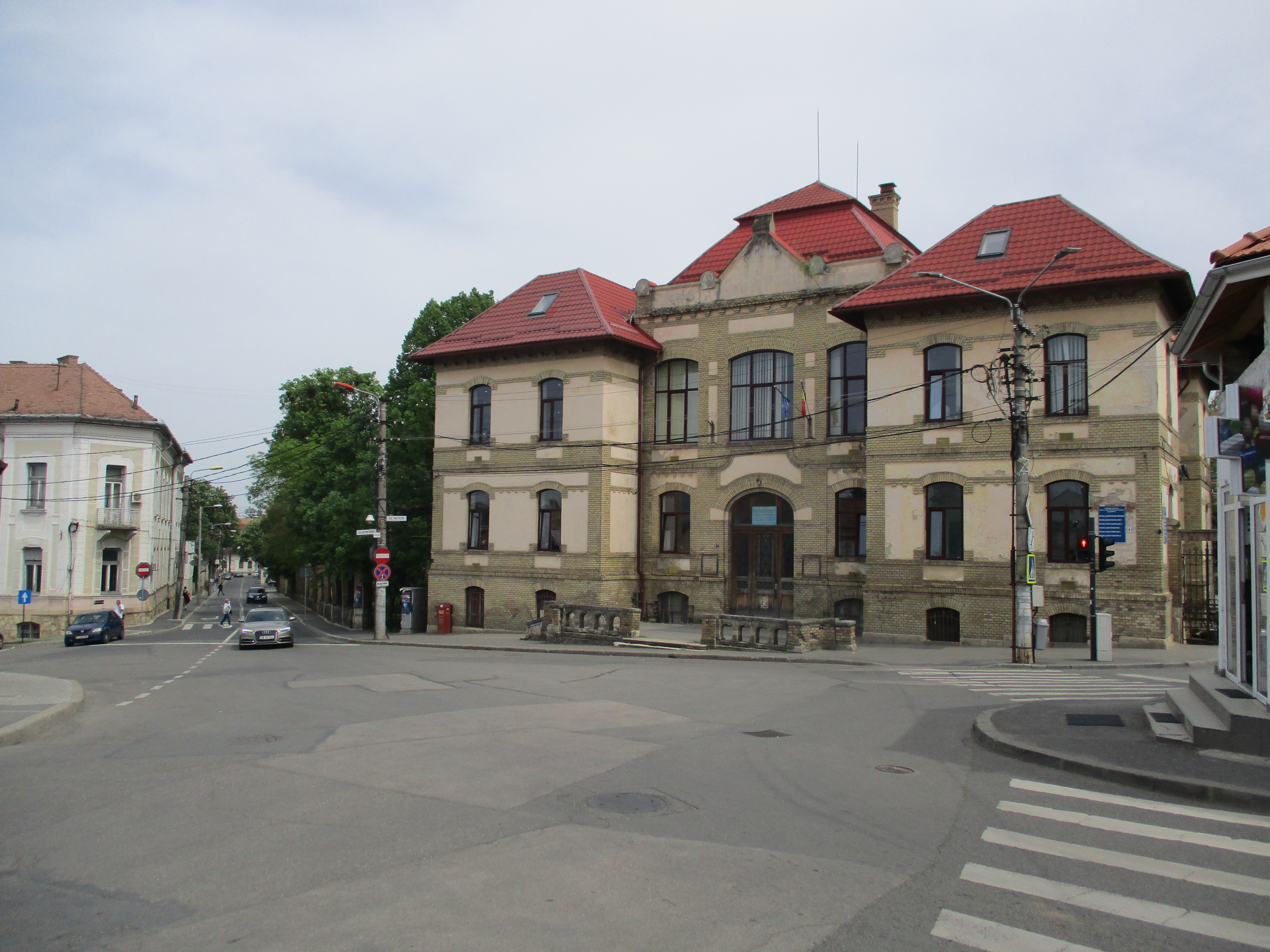 Psychiatric Clinic 1 Cluj-Napoca